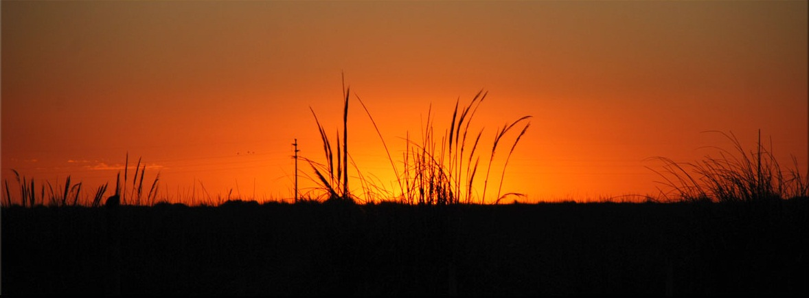 Atardecer en Campos del Tuyú